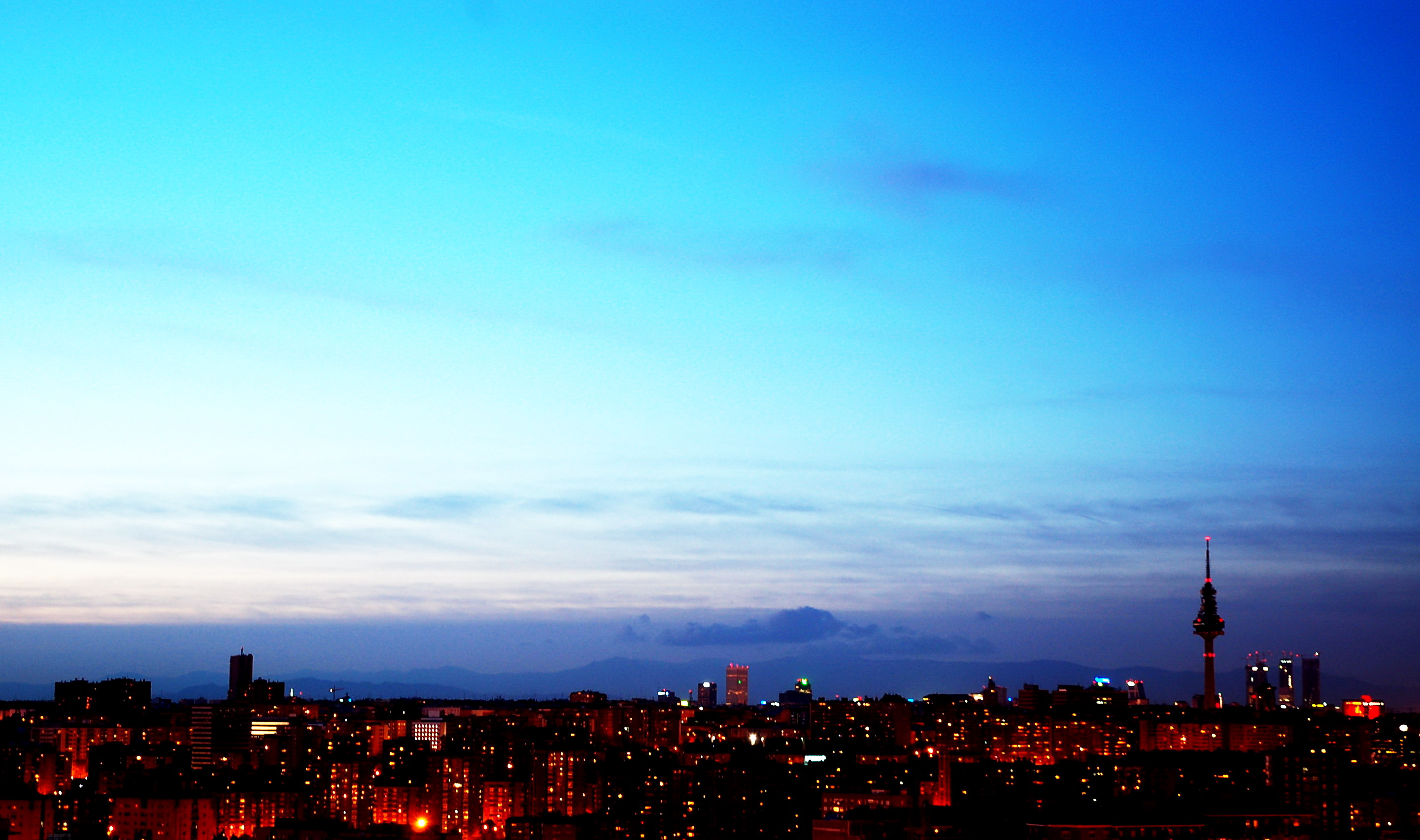 Madrid skyline